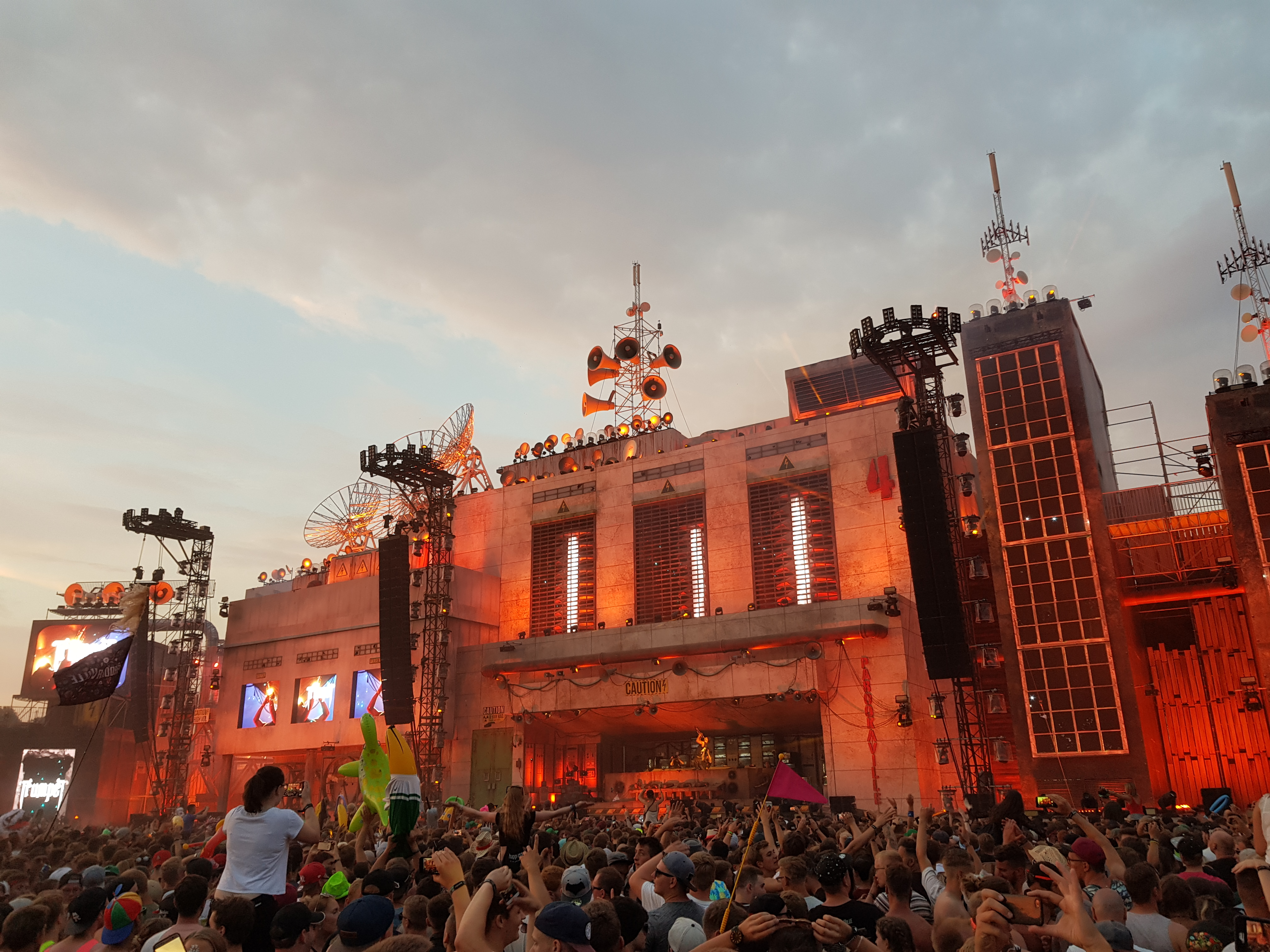 Parookaville Mainstage 2018